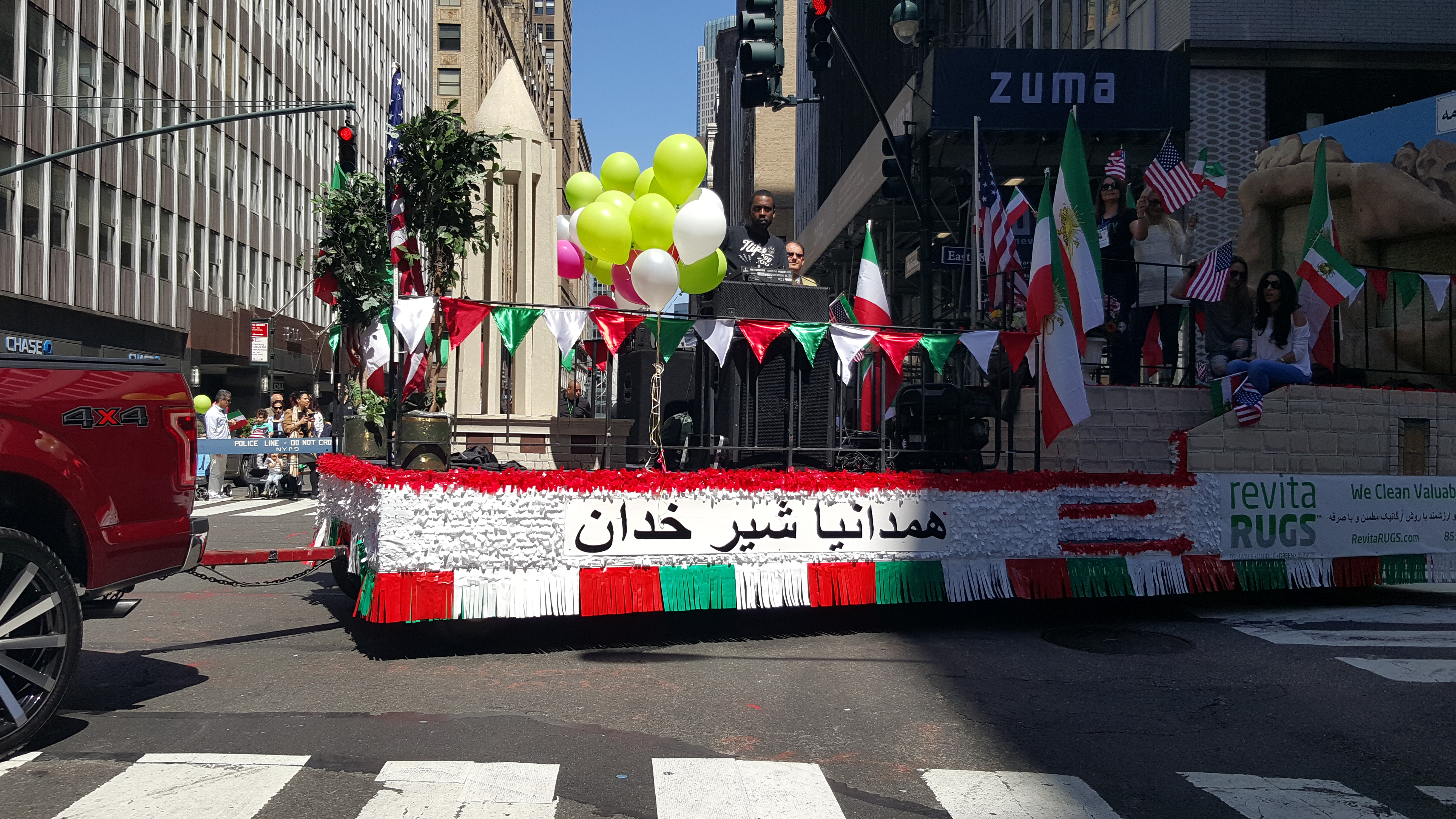 ارابه همدان در رژه ایرانیان نیویورک 2016 در خیابان مدیسون